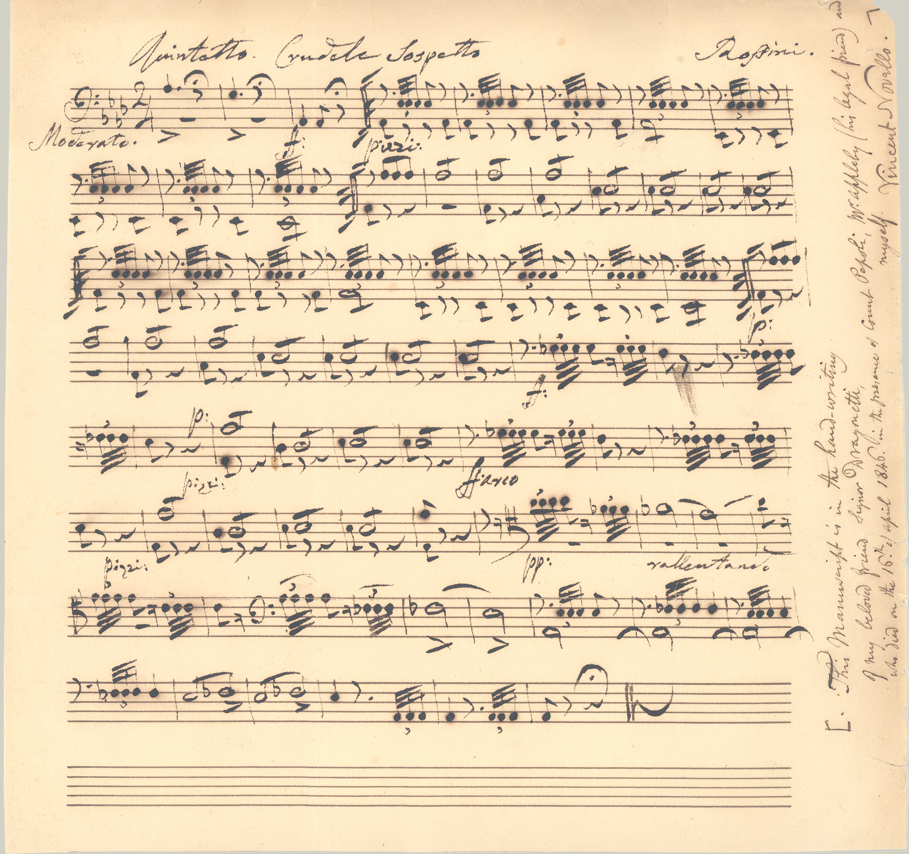 Handschriftlicher Auszug aus der Kontrabass-Stimme eines Streichquintetts von Gioachino Rossini (1792-1868), notiert von Domenico Dragonetti (1763-1846)